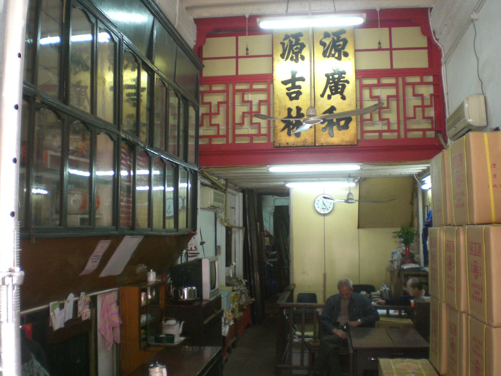 上環蘇杭街